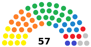 Distribución final de Asamblea Legislativa 2014